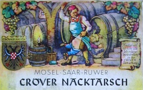 Cröver Nacktarsch, Weinetikett aus dem Jahr 1954.